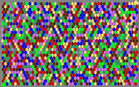 Eine möglische Startaufstellung bei einen hexagonalen Spielbrett